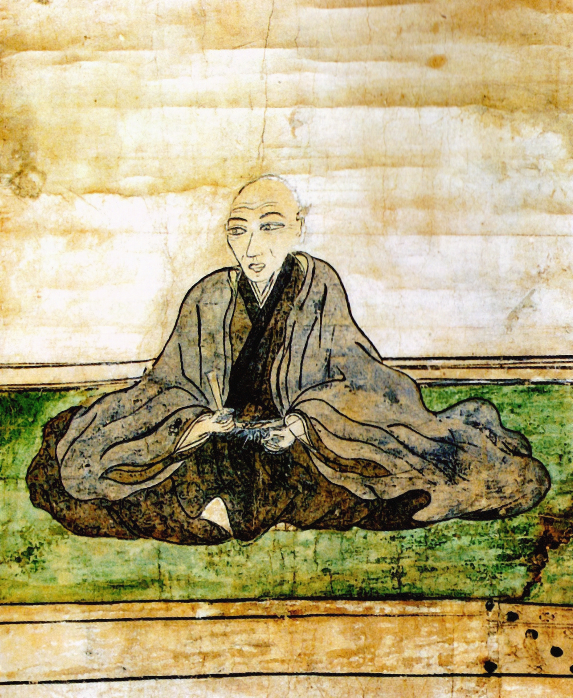 堀秀政の肖像。